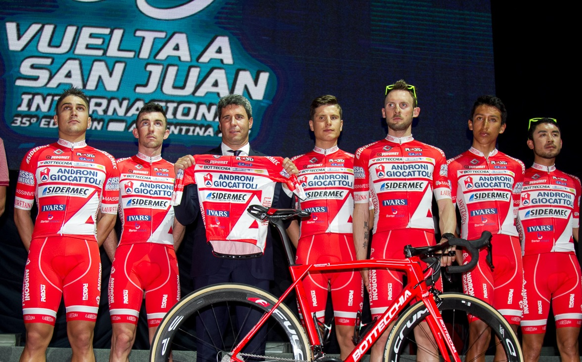 Vuelta a San Juan 2017 - Androni Giocattoli-Sidermec (Italia) Depicted team: Androni Giocattoli